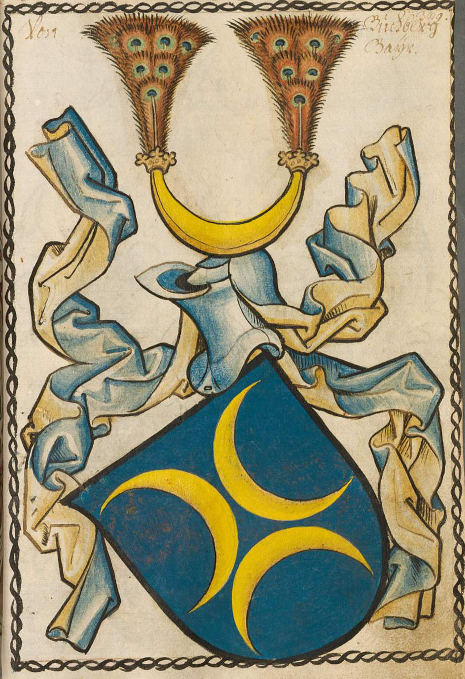 Scheibler'sches Wappenbuch , älterer Teil Bayern Puchberg